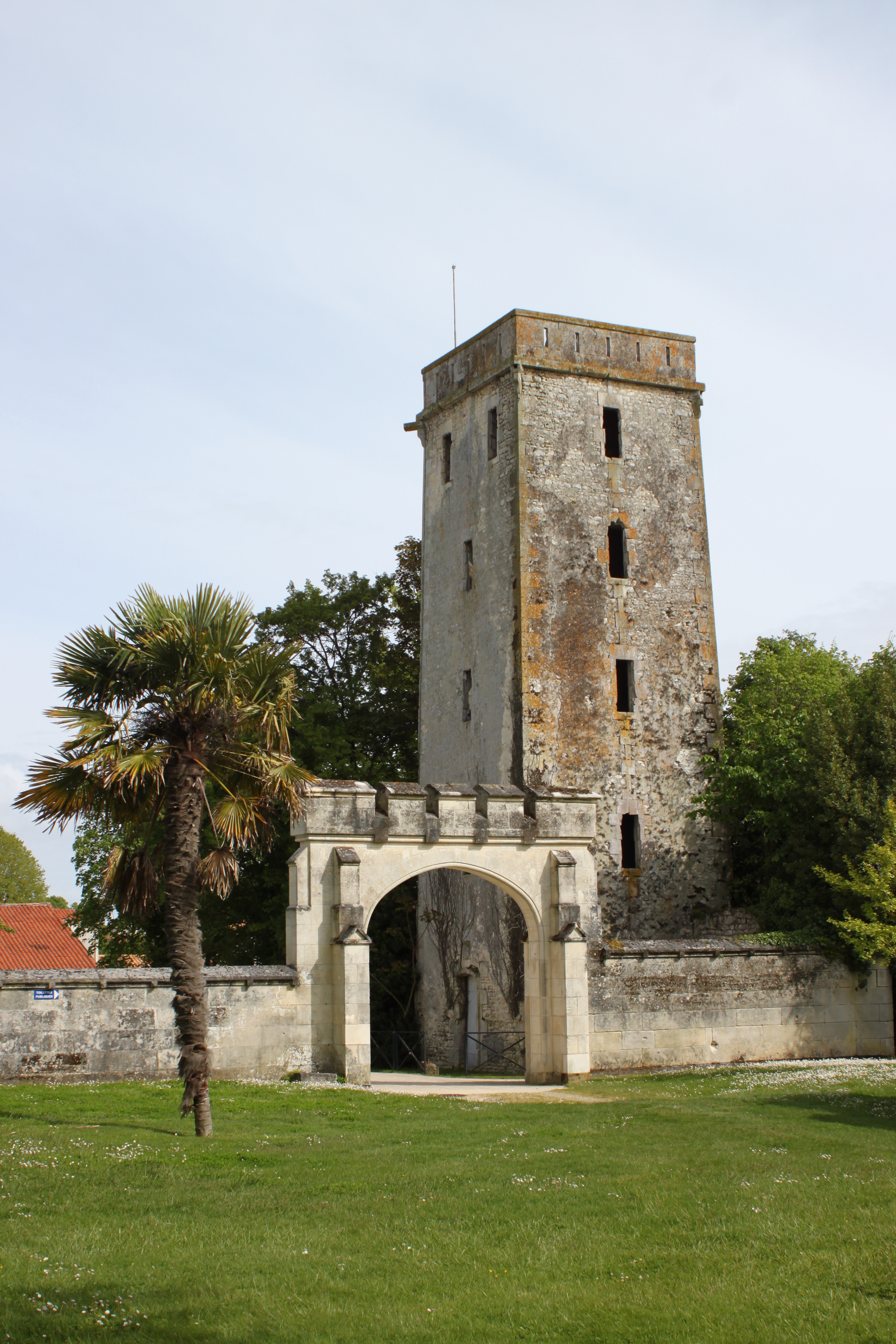 Ancienne tour de l'abbaye, Fr-17-Vaux-sur-Mer.